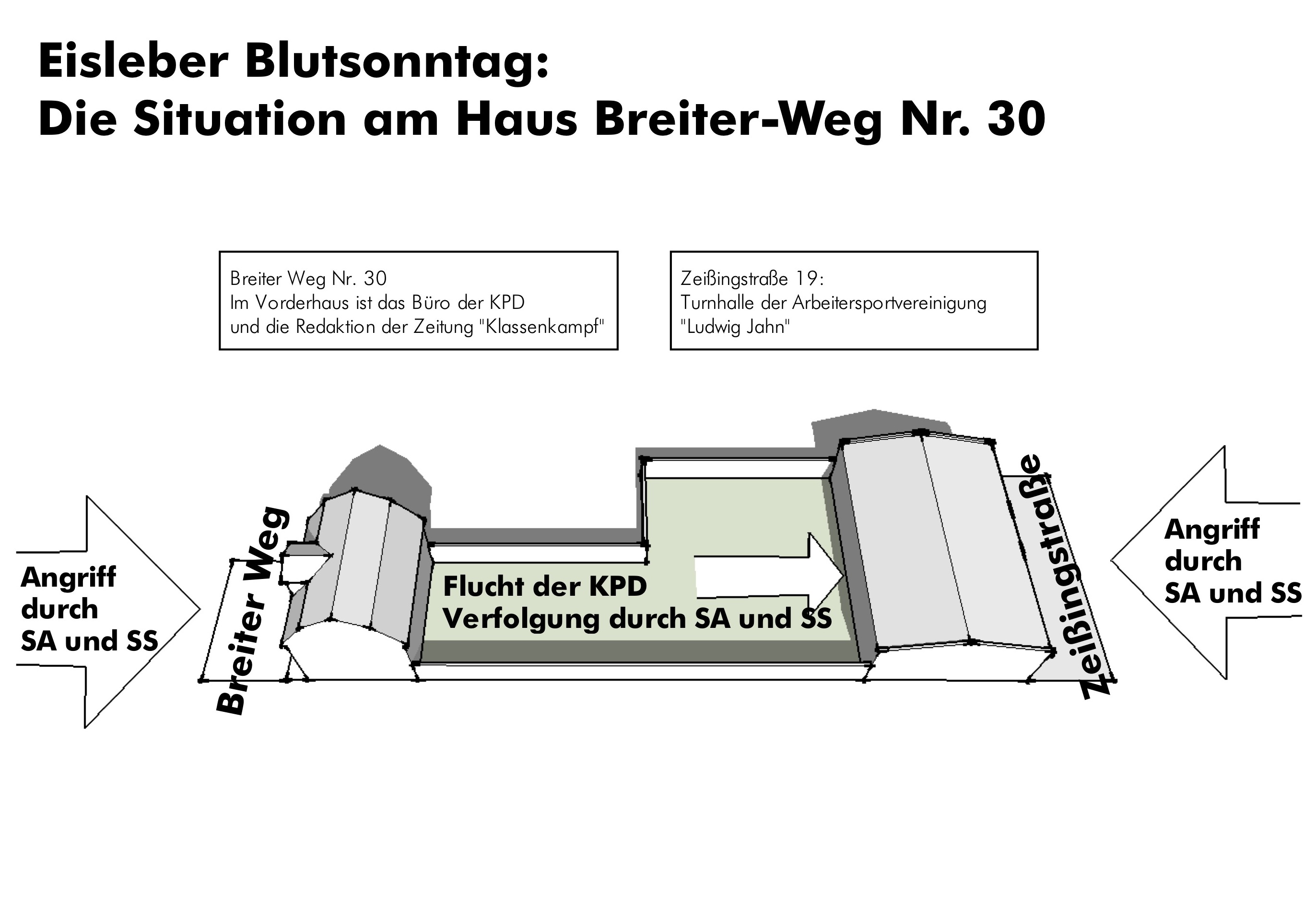 Eisleber Blutsonntag. Schematische Darstellung der Situation beim Grundstück Breiter-Weg-30.